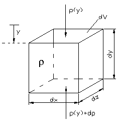 Druckkräftegleichgewicht am infinitisemalen Volumenelement in y-Richtung